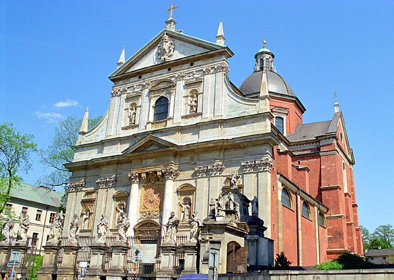 Krakow (Poland) St Peter and Paul Church